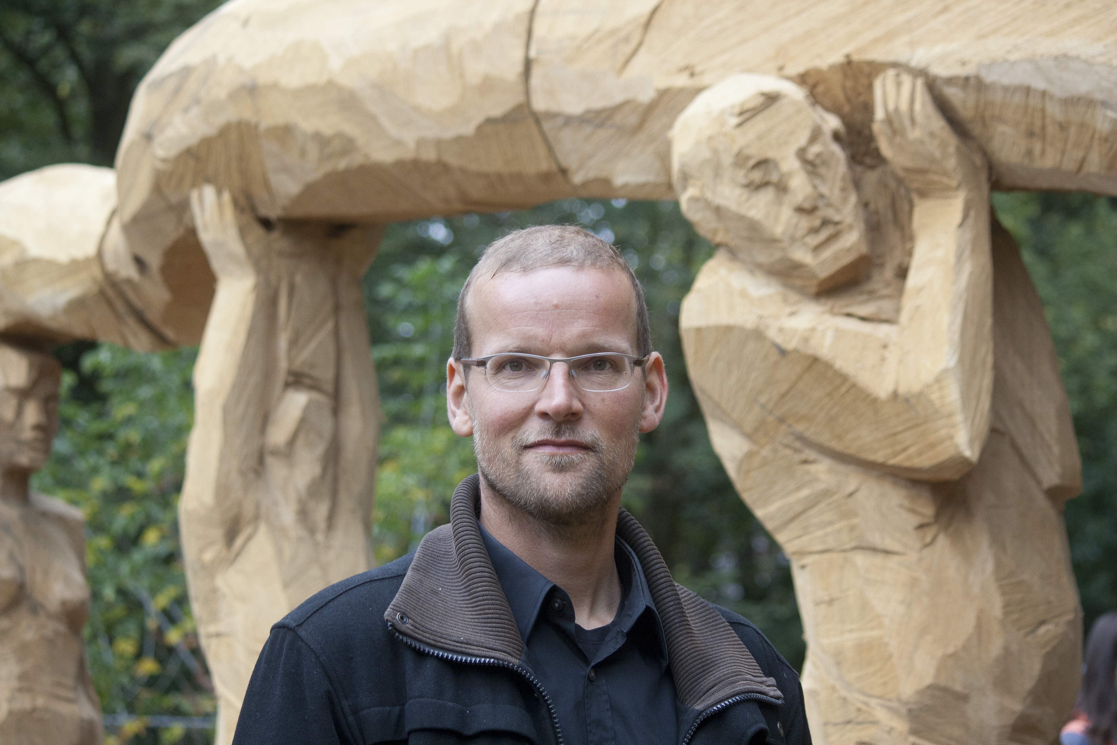 Der deutsche Bildhauer Christian Rösner (geboren 1969) vor seiner Skulptur Wasserschlange in Rodgau (Hessen).